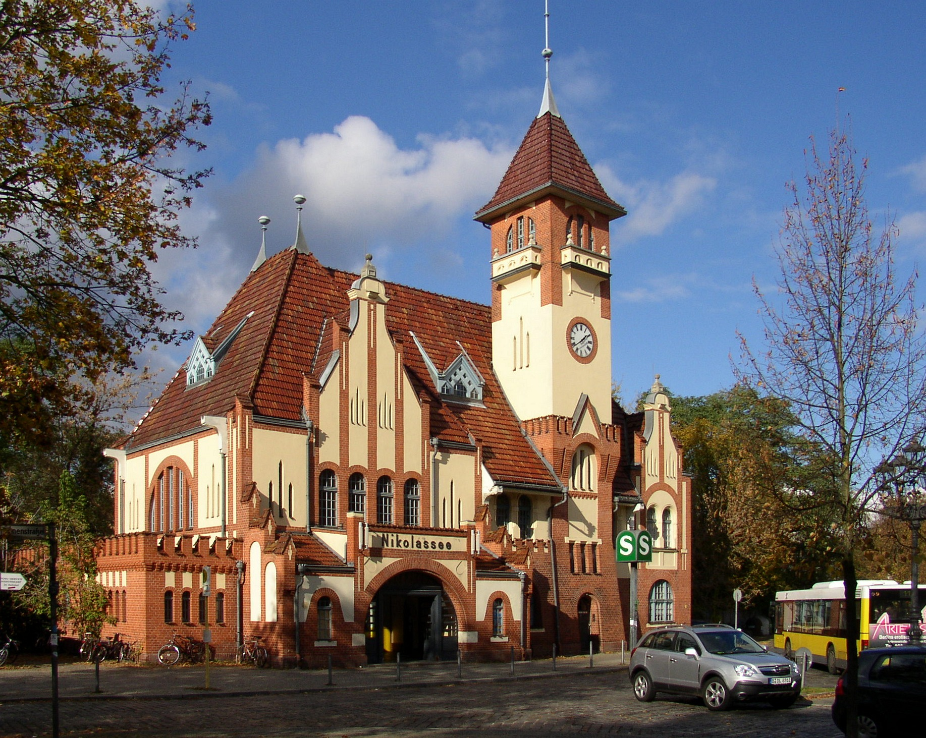 S-Bahnhof Nikolassee in Berlin